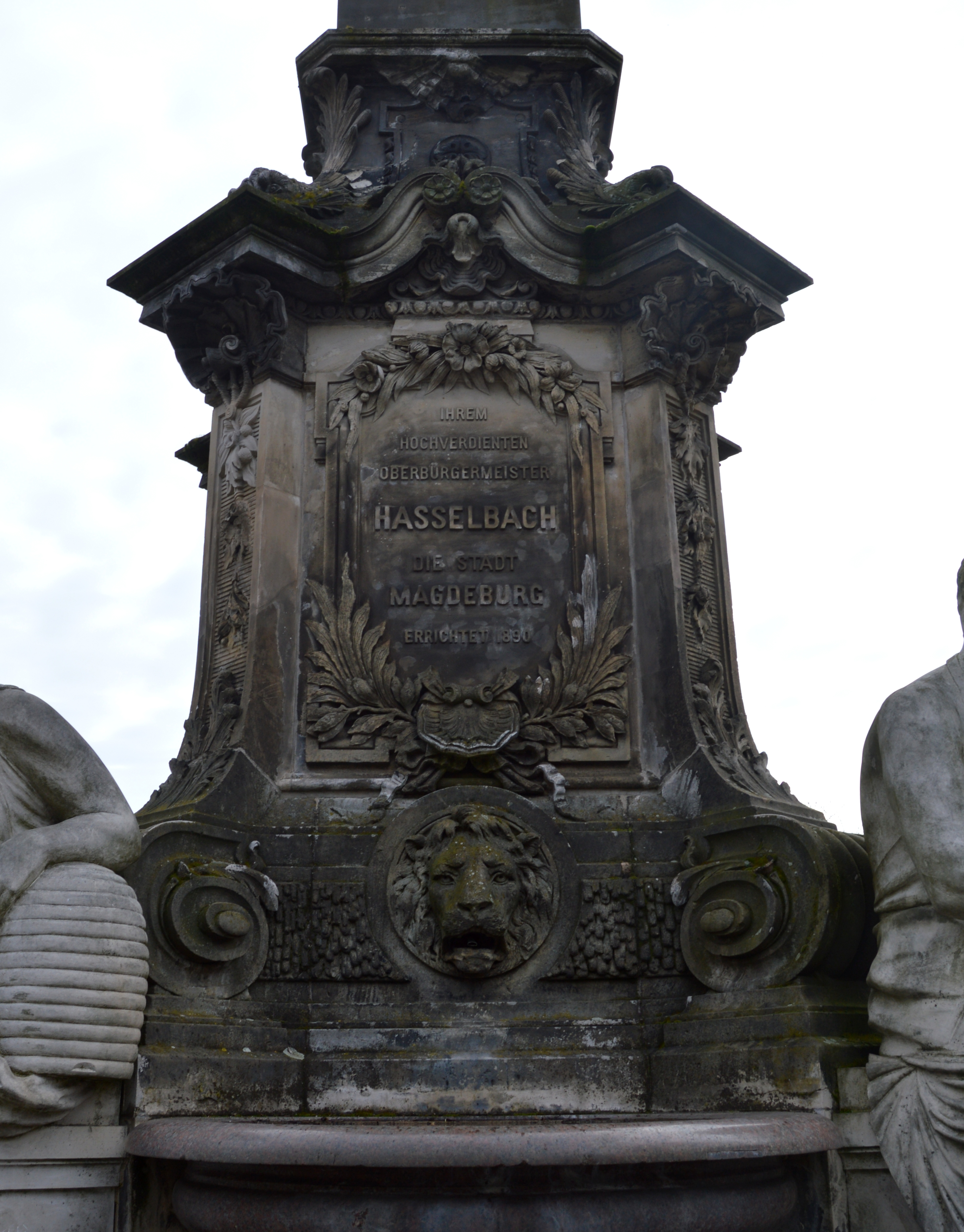 Hasselbachbrunnen